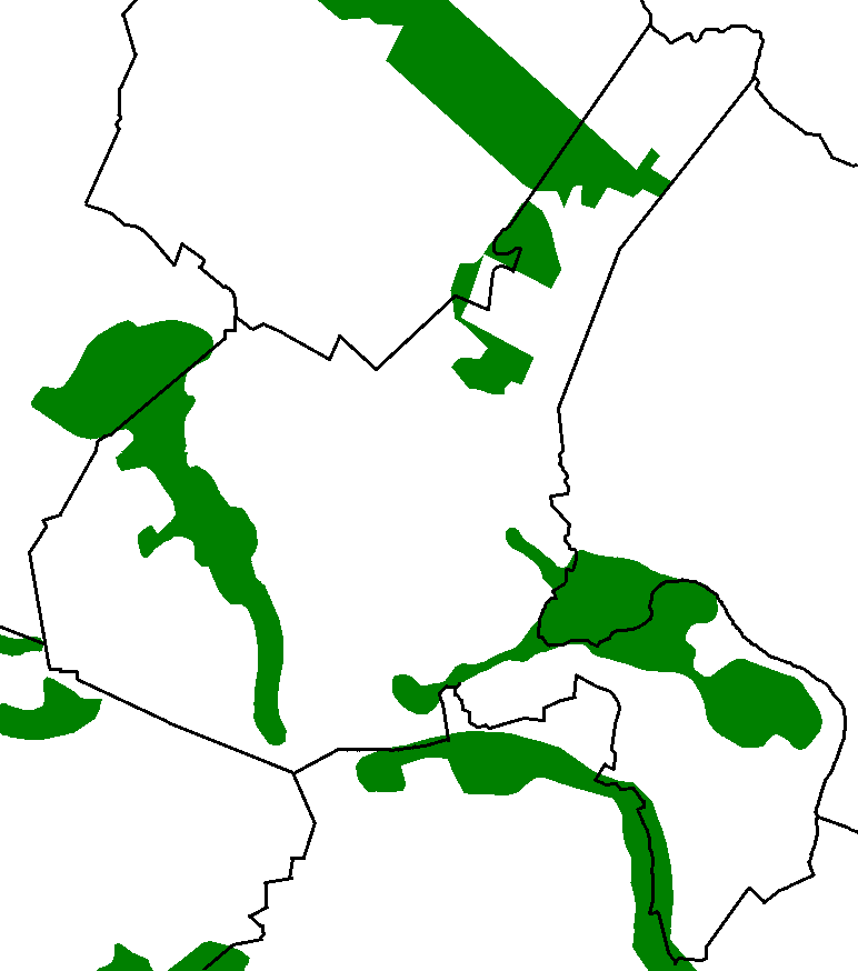 Carte des zones naturelles d'intérêt écologique, faunistique et floristique de types I et II présentes sur le territoire de Villefontaine. This map may be incomplete, and may contain errors. Don't rely solely on it for navigation.